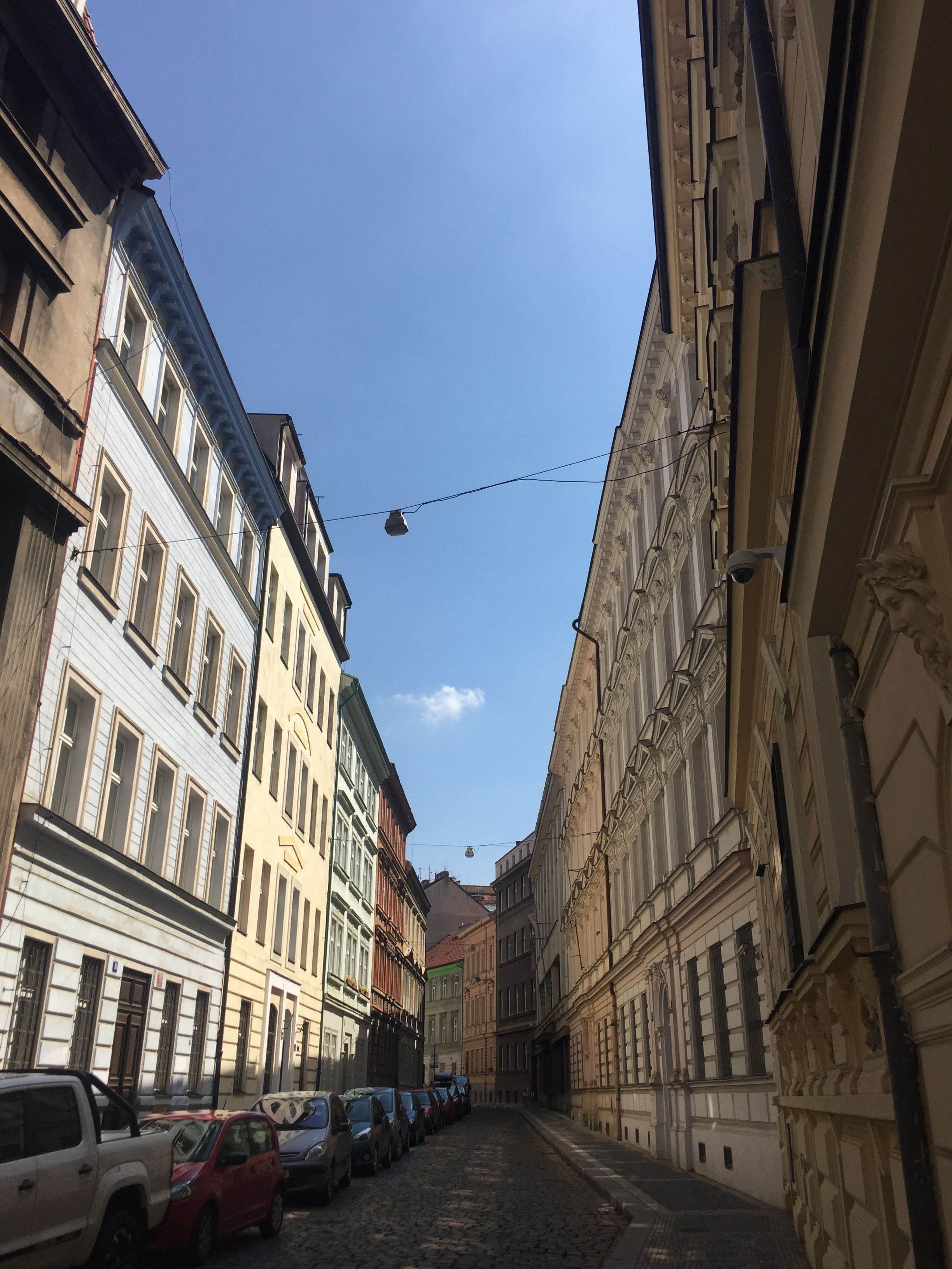 Pohled do Černé ulice od Opatovické ulice